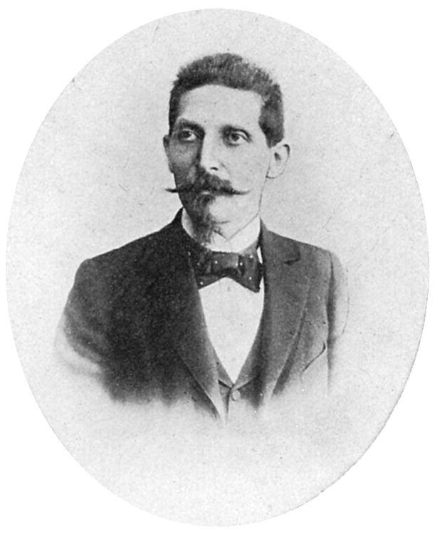 Stadtverordneter Leopold Rosenow als Mitglied des Geschäftsführenden Ausschusses der Gewerbe-Ausstellung.